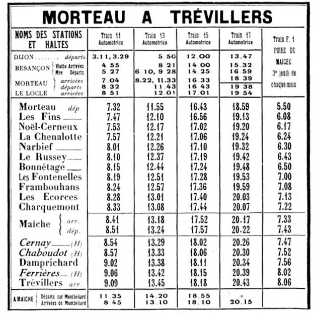 Horaires de 1936 des trains de la ligne des chemins de fer Régionaux de Franche-Comté (RFC) de Morteau à Trévillers (Doubs, France).